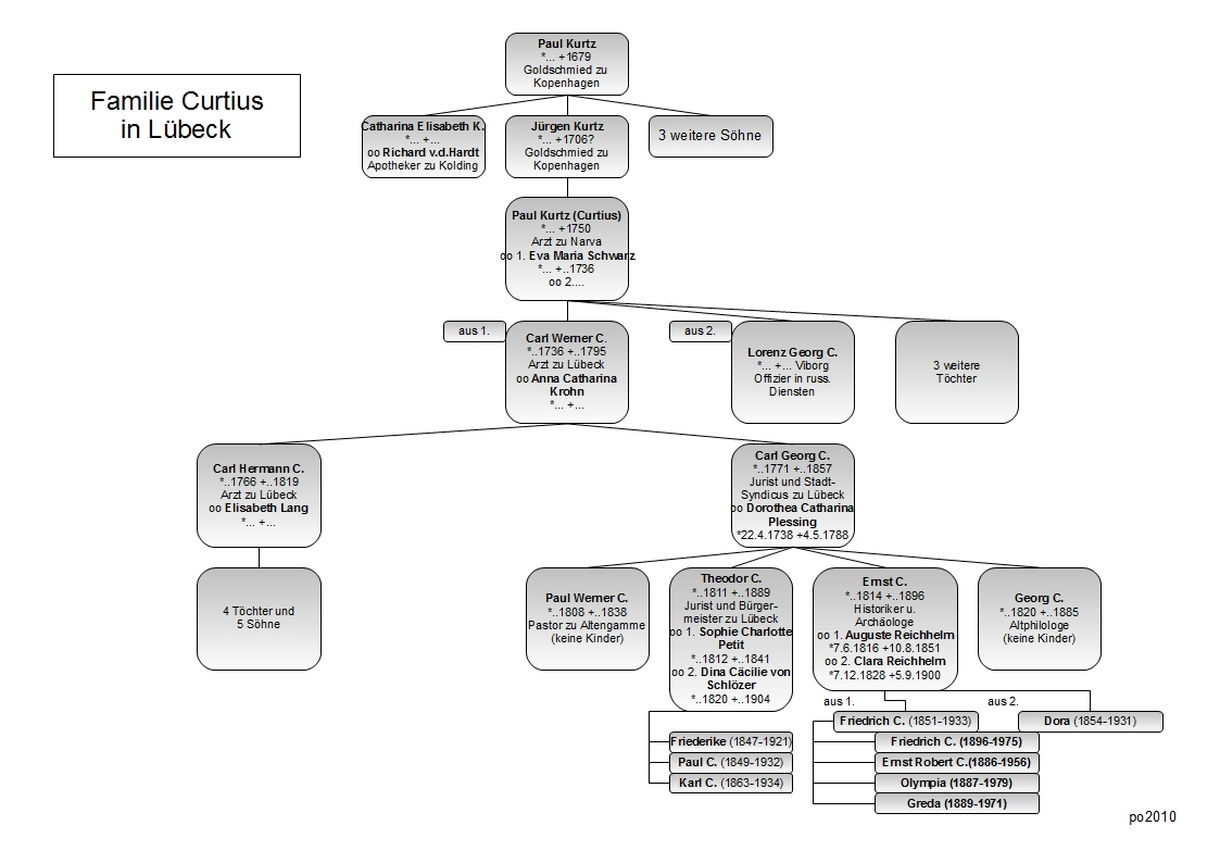 Stammtafel der Familie Curtius zu Lübeck